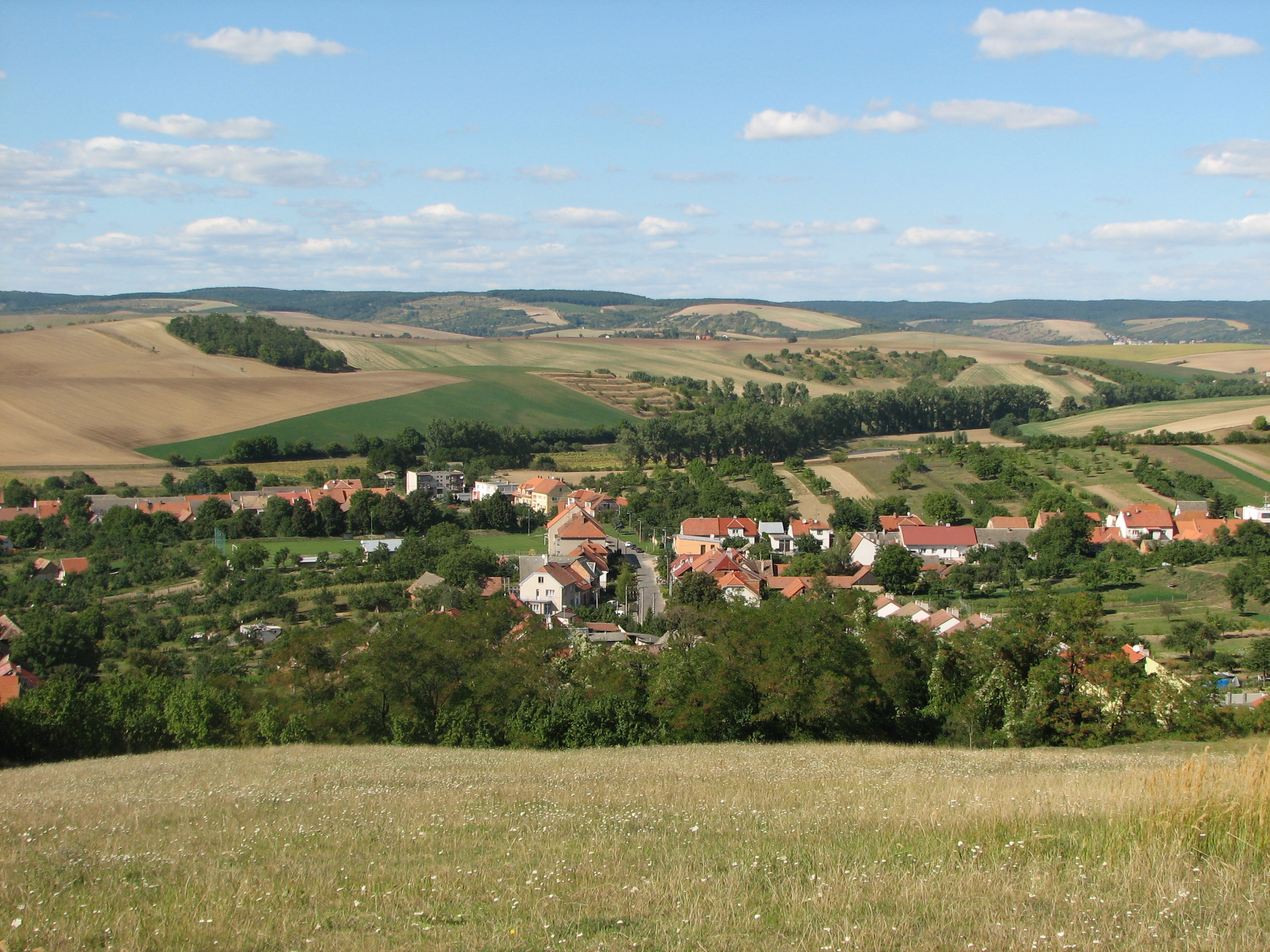 Želetice - pohled z kopce